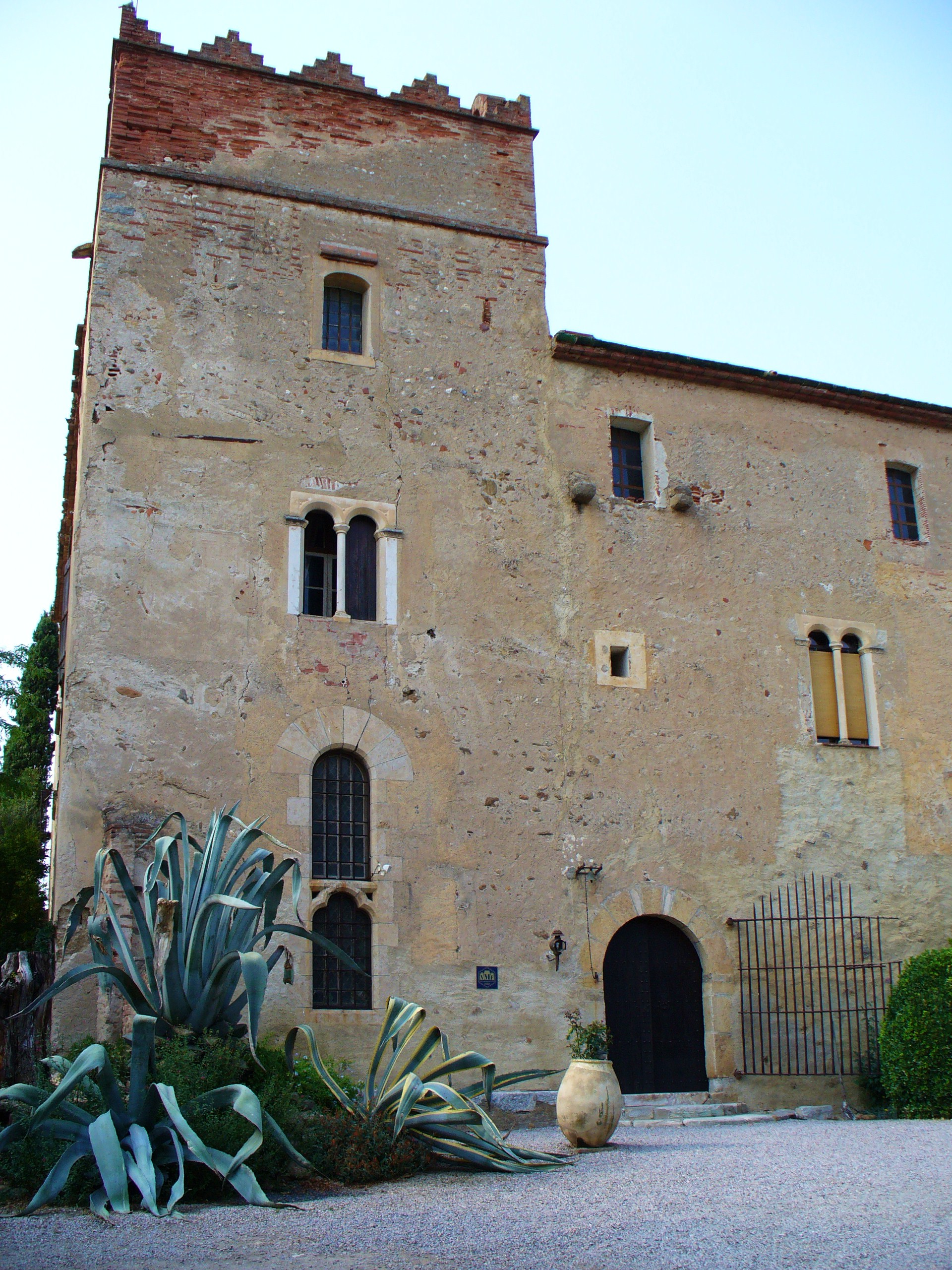 Das Kloster Monastir del Camp